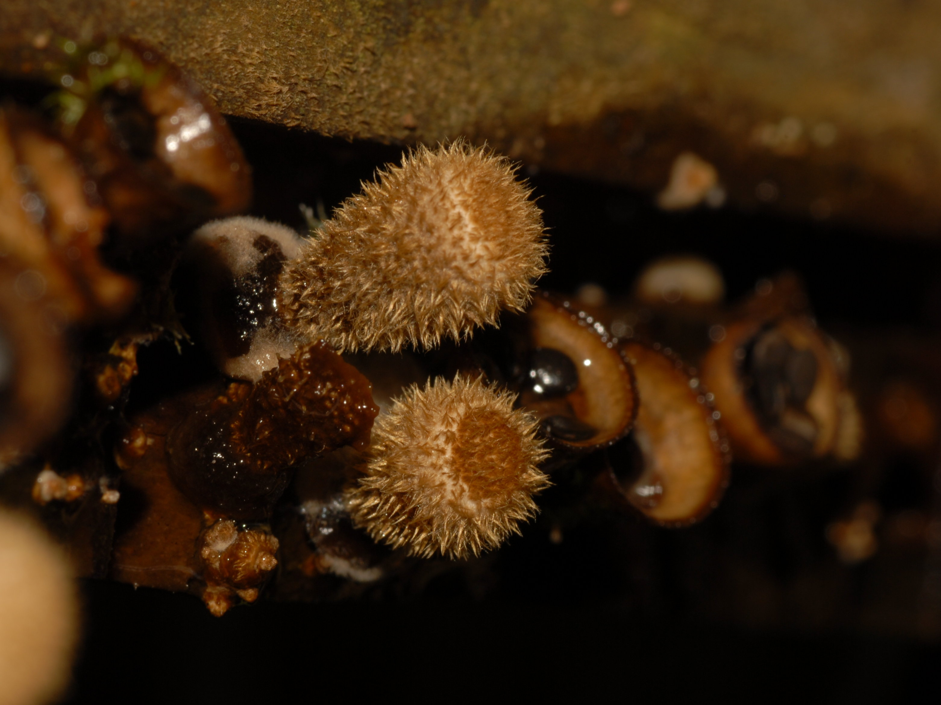 Unreife Fruchtkörper des Dung-Teuerlings (Cyathus stercoreus)